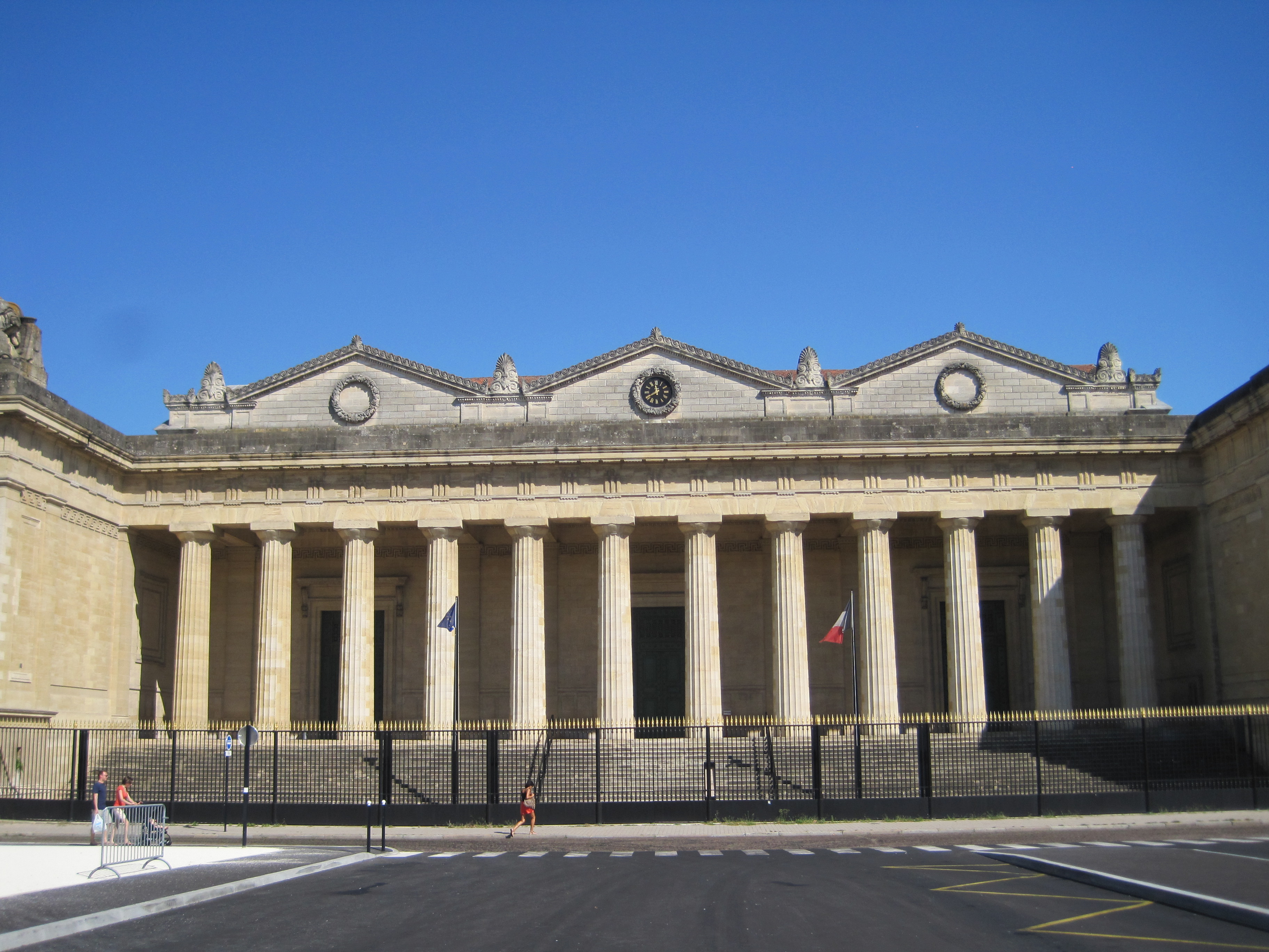 Façade du palais de justice de Bordeaux (Cour d'appel) Architecte THIAC (1846)